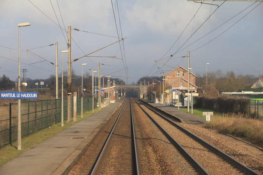 Vue générale de la gare de Nanteuil-le-Haudouin en direction de Crépy-en-Valois (décembre 2012), Picardie, France.